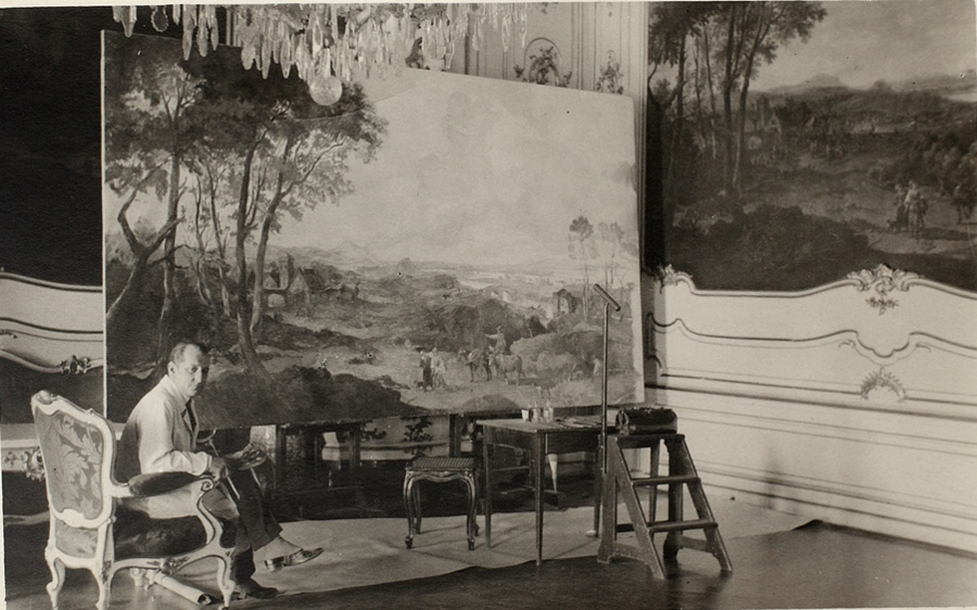 Otto Nowak restaurierte auch in Schönbrunn; das Foto zeigt ihn bei der Arbeit.